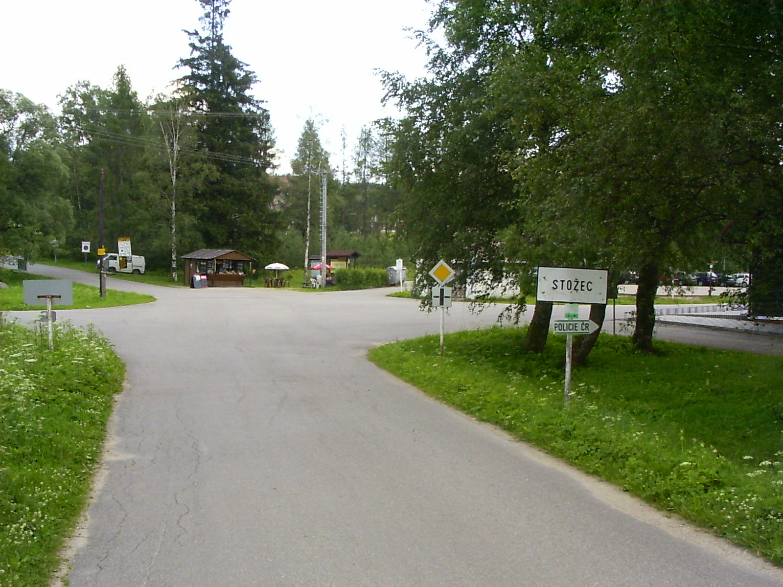 Kreuzung in Tusset (cz)